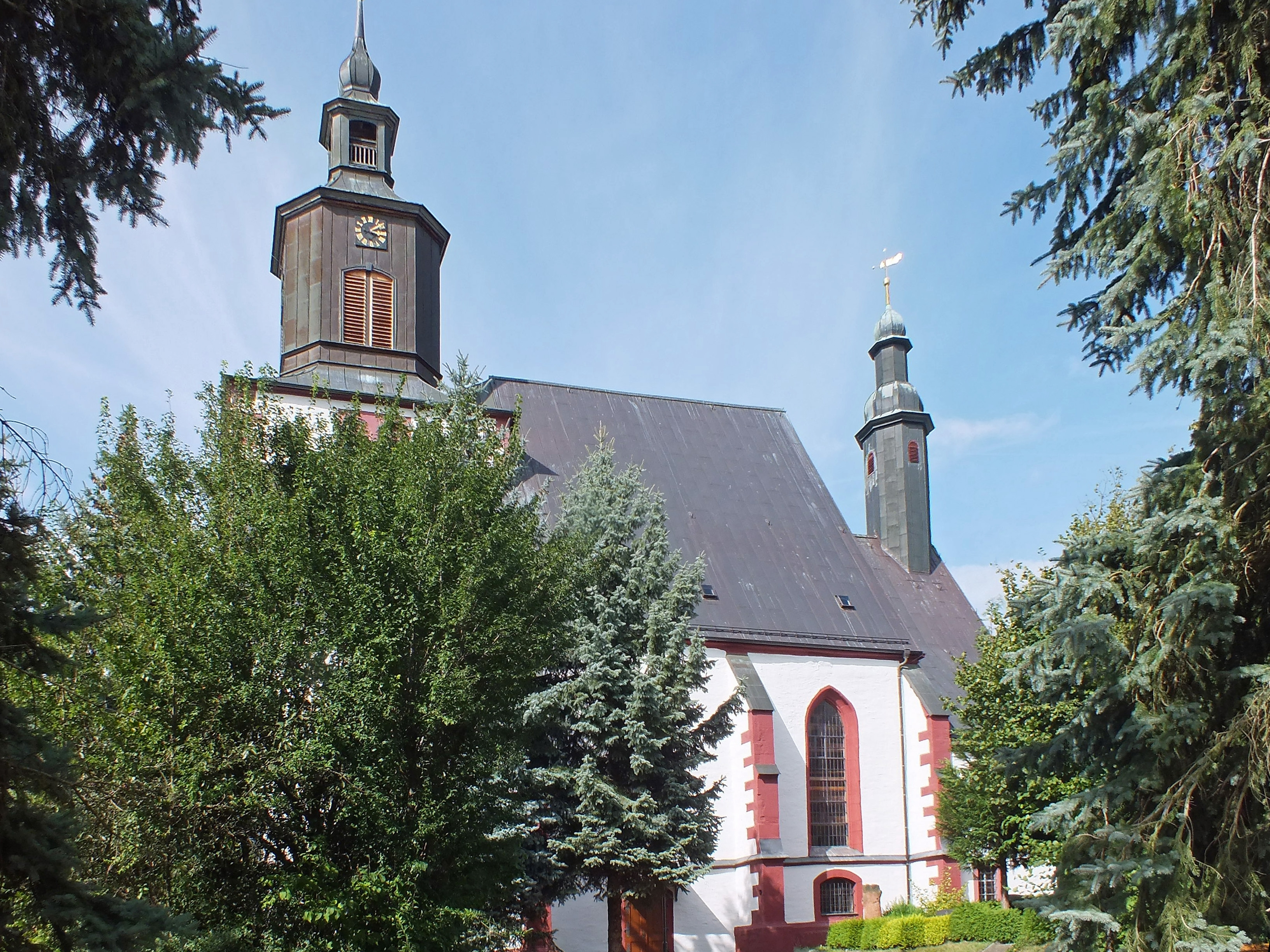 St. Annenkirche Seelitz, Südseite